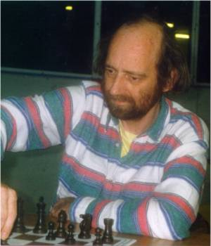 Johan van Mil. Foto mag gebruikt worden op WikipediaNL mits bepaalde voorwaarden: "Het mag, mits mijn naam als fotograaf bij de foto's komt te staan.